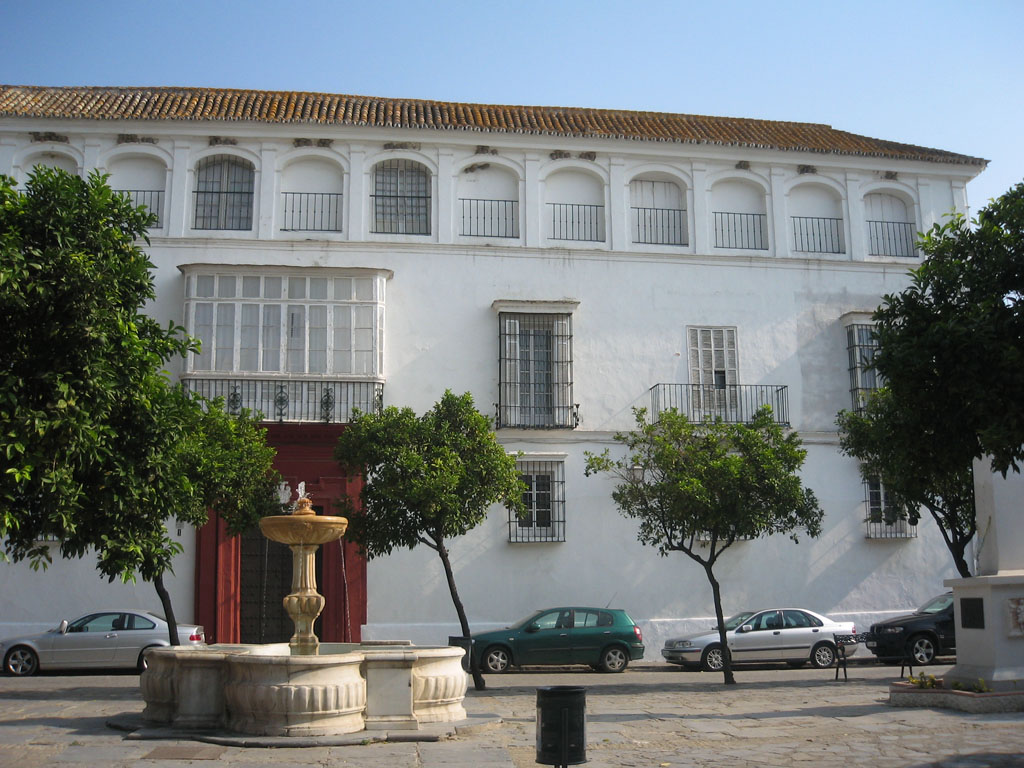 Casa de Moreda (hoy Casa de Manjón), en Sanlúcar de Barrameda-Cádiz-Andalucía-España